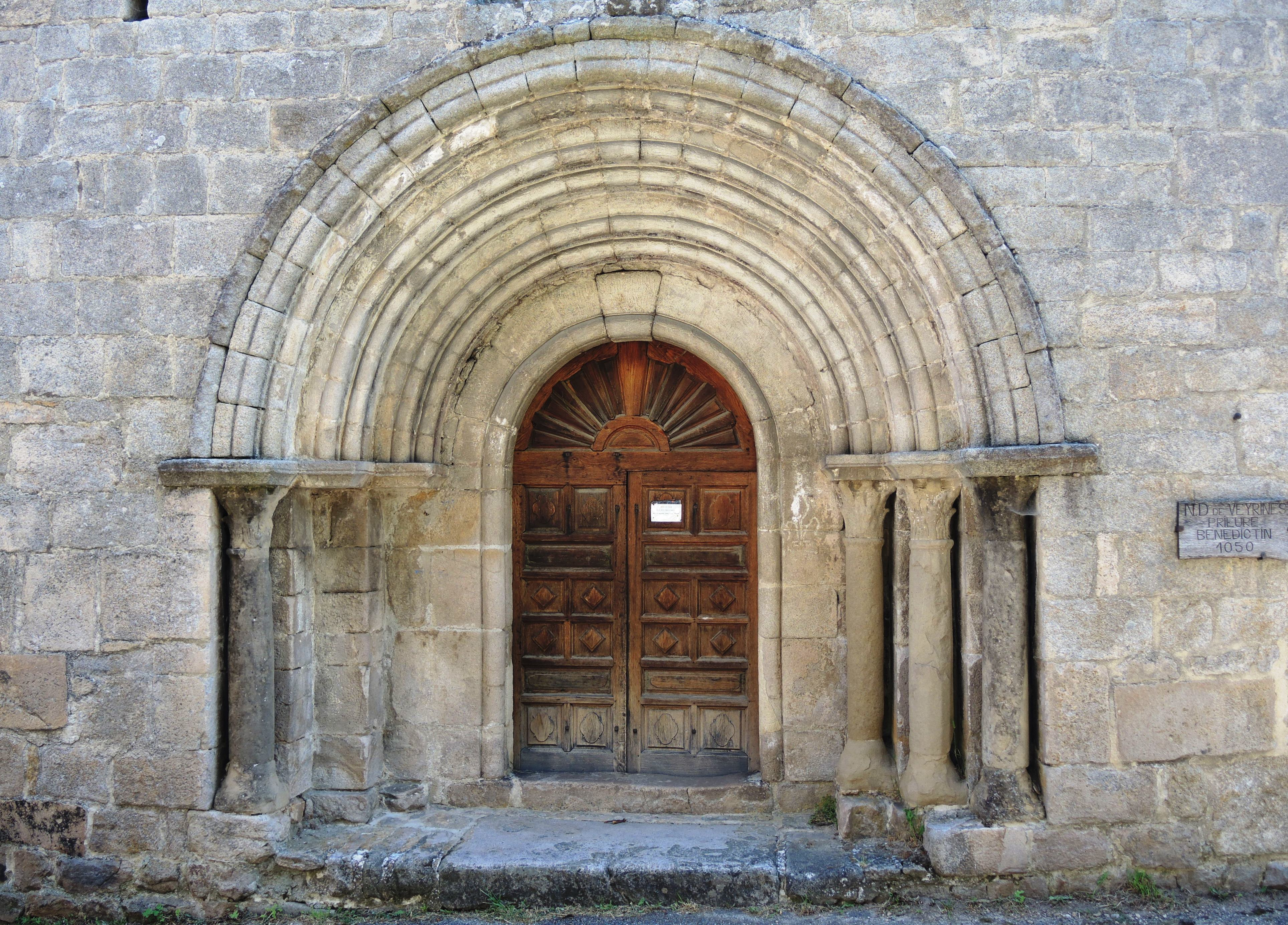 Veyrines St-Symphorien de Mahun portail